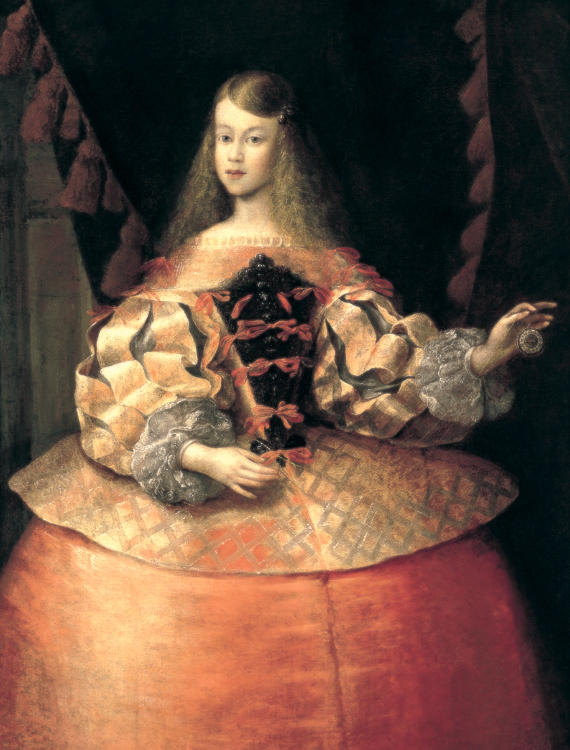 Margherita Maria Teresa d'Asburgo, Infanta di Spagna e Sacra Romana Imperatrice